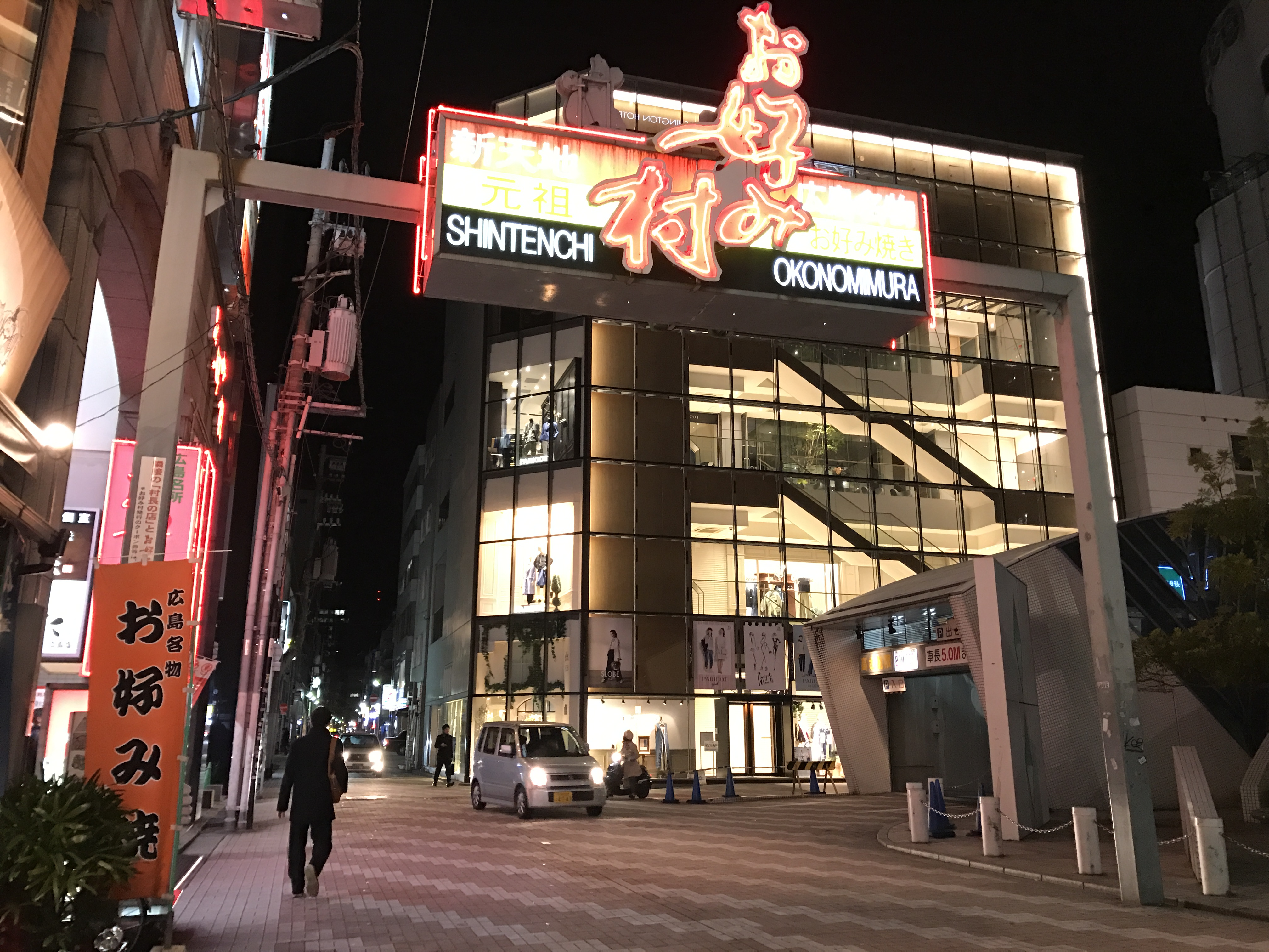 お好み村の看板